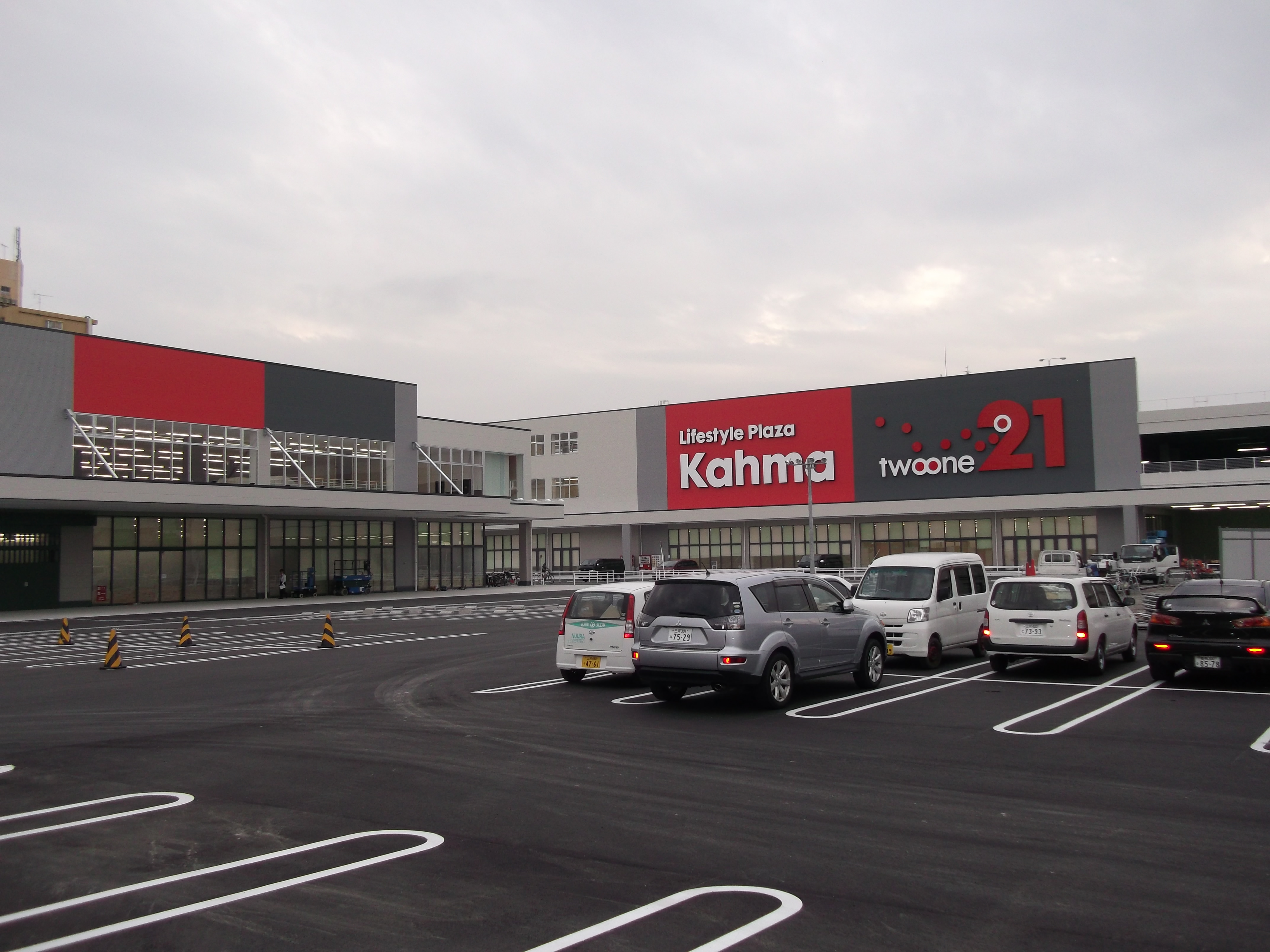 名古屋市北区のカーマ21名古屋城北店（工事中）を北側公道より撮影